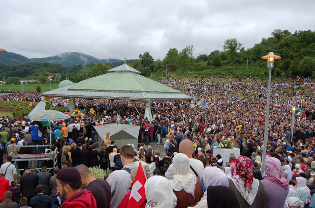 Potocari2007